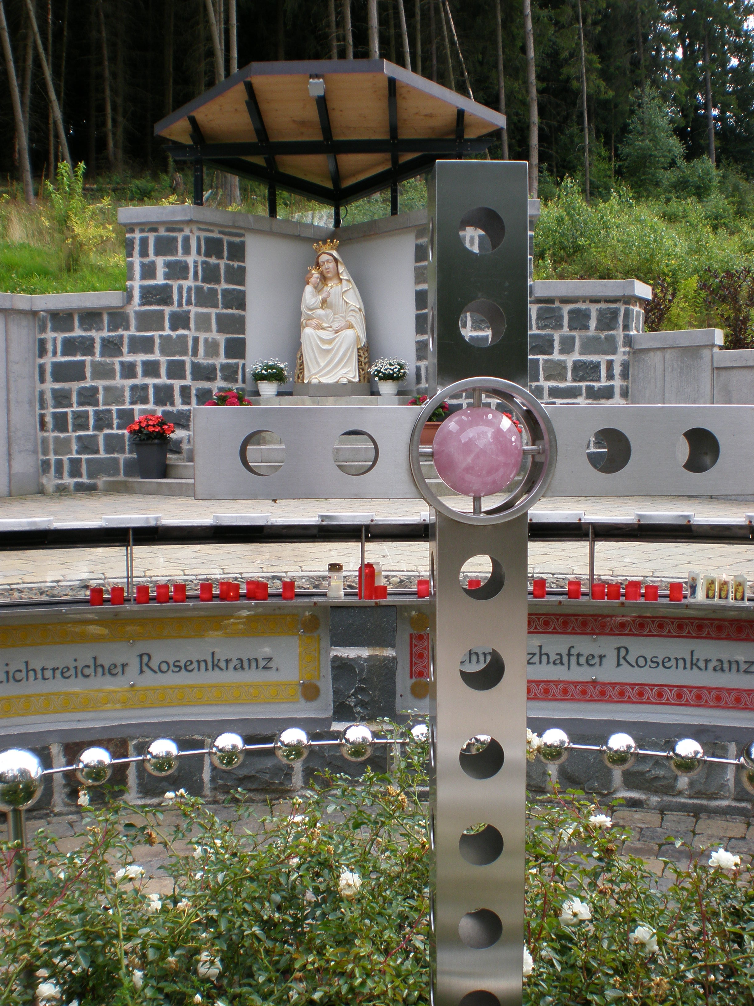 Marienfigur im Wallfahrtsort Marpingen